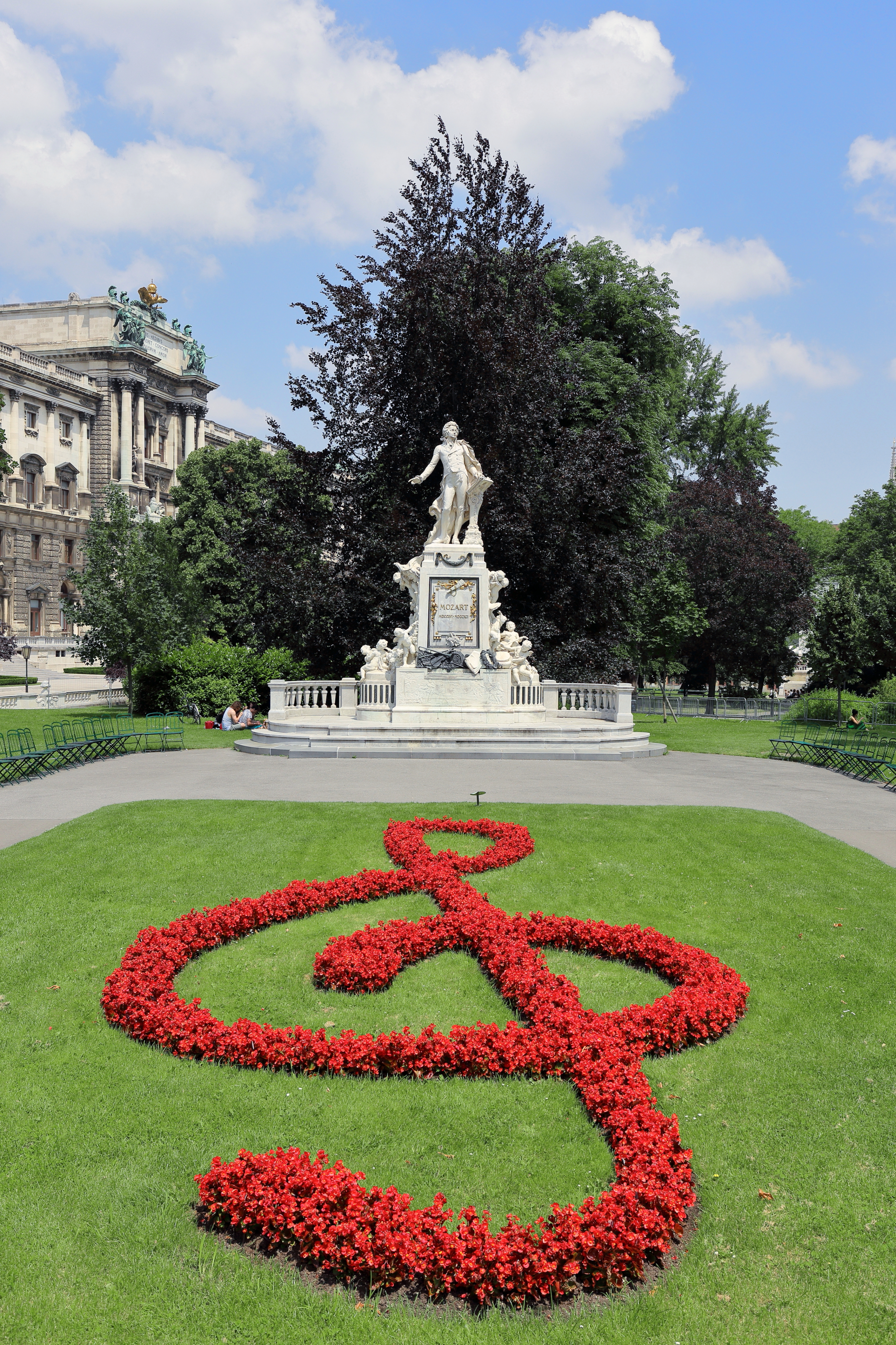 Das Mozartdenkmal im Burggarten im 1. Wiener Gemeindebezirk Innere Stadt.Das 7,5 Meter hohe Monument wurde von dem Architekten Karl König und dem Bildhauer Viktor Tilgner geschaffen und am 21. April 1896 auf dem Albrechtsplatz (heute Albertinaplatz) enthüllt. Nach dem II. Weltkrieg und Wiederinstandsetzung wurde es 1953 im Burggarten aufgestellt.Dargestellt ist der Komponist mit Notenpult auf einem Sockel, der mit Ornamenten, Masken und Kränzen geschmückt ist und von einer halbkreisförmigen Balustrade aus grobem Sterzinger Marmor (Südtirol) umrahmt wird. Auf dem vorderen Flachrelief ist die Einladung und das Erscheinen des Steinernen Gastes aus der Oper „Don Giovanni“ dargestellt und auf dem rückseitigen Hochrelief der sechsjährige Komponist am Klavier, sein Vater mit der Geige und seine Schwester Nannerl.